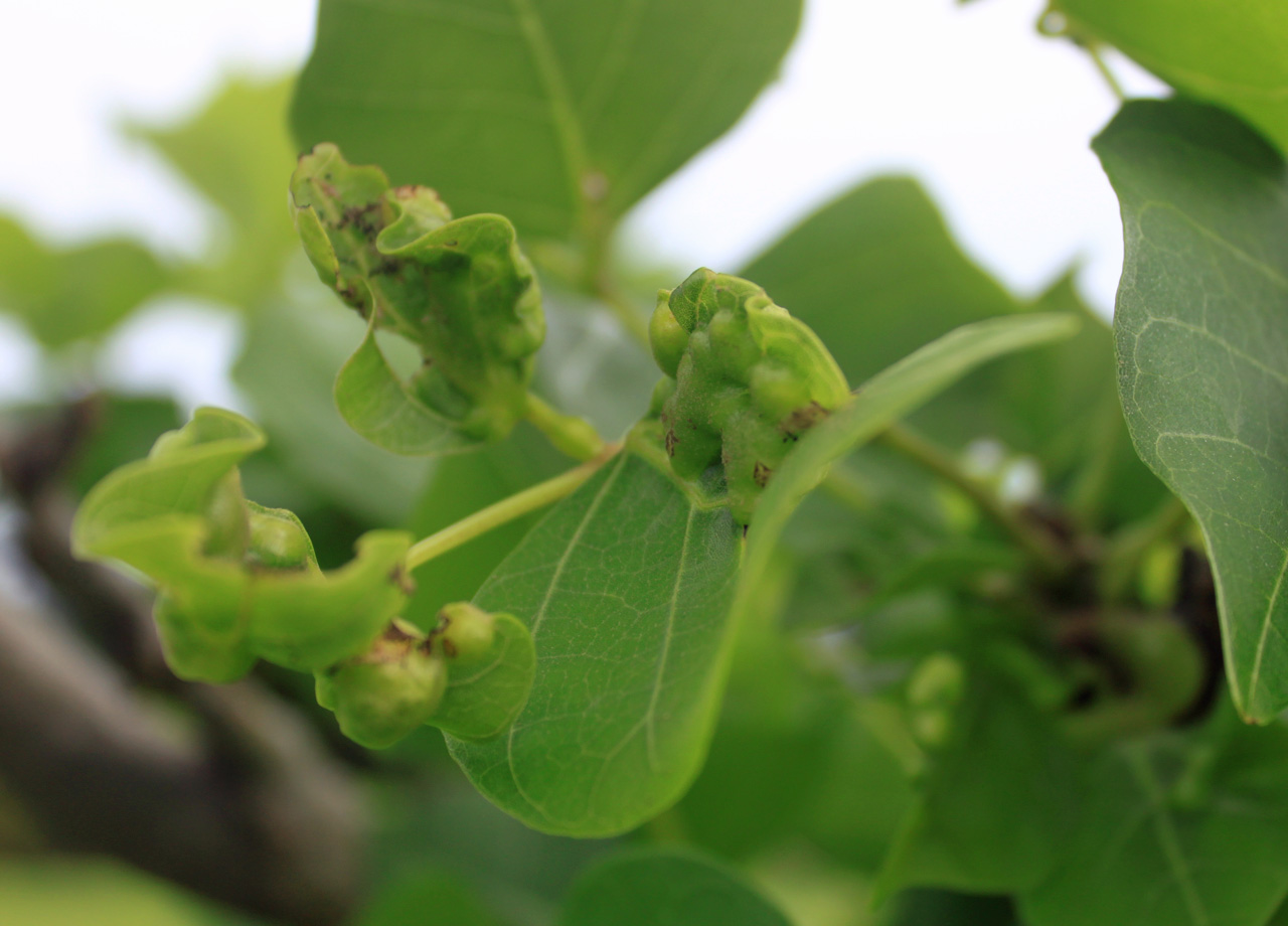 A gall on Coral Tree(Erythrina variegata).デイゴヒメコバチにより作られたデイゴ上の虫こぶ